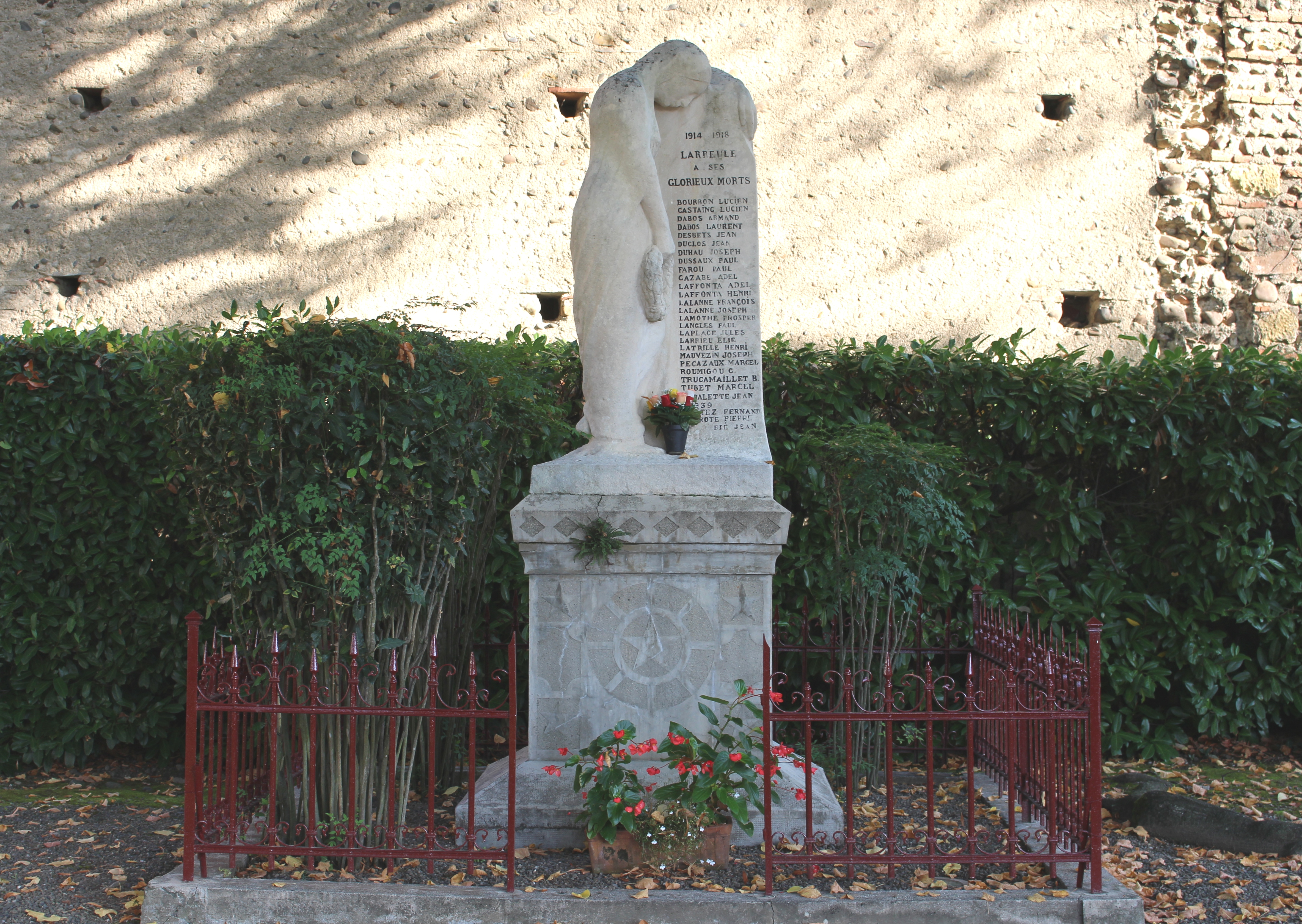 Monument aux morts de Larreule (Hautes-Pyrénées)